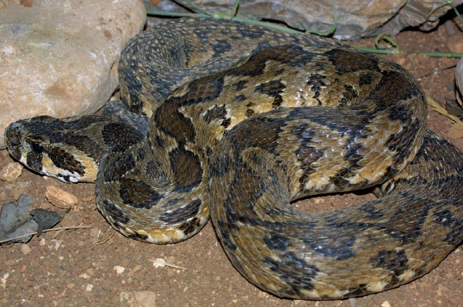 Vipera palaestinae (synonim Daboia palaestinae)[1]